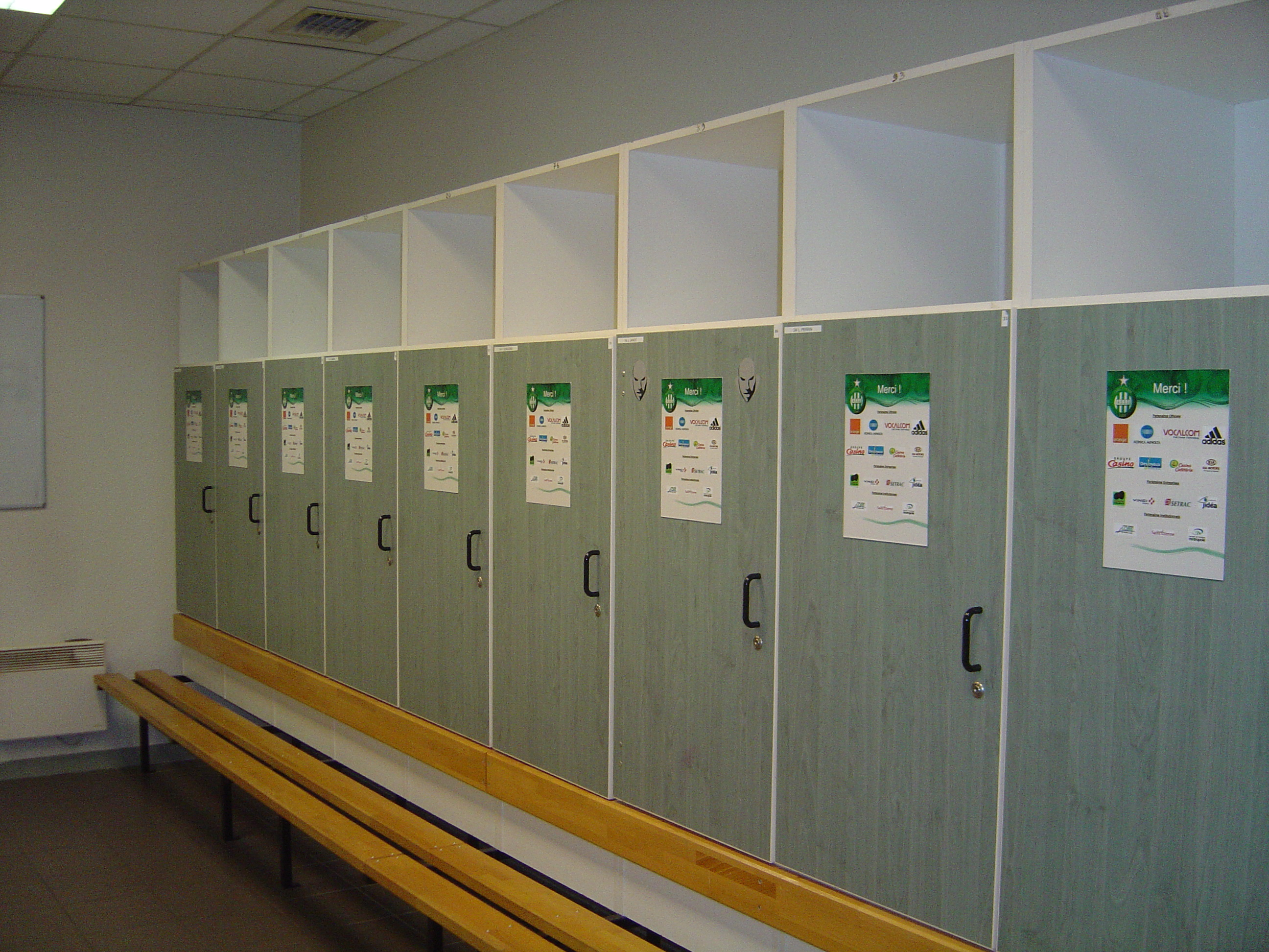 Bancs et casiers dans le vestiaire du stade Geoffroy-Guichard. Photo prise par Mickaël Roure alias Altrensa pour Wikipédia Licensing Catégorie:Image de l'ASSE